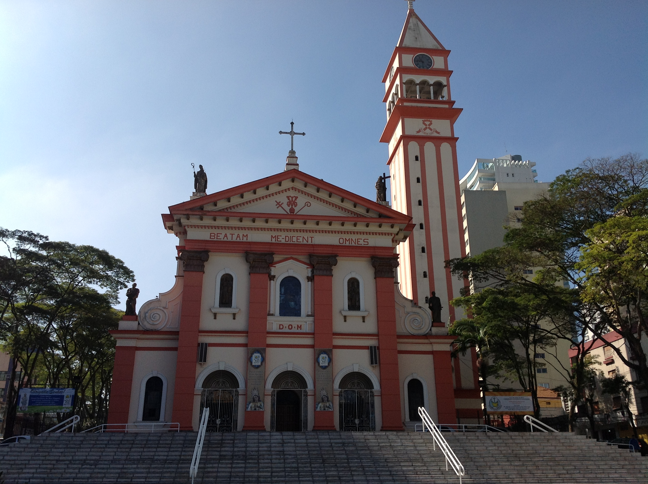 Centro, São Bernardo do Campo - SP, Brazil